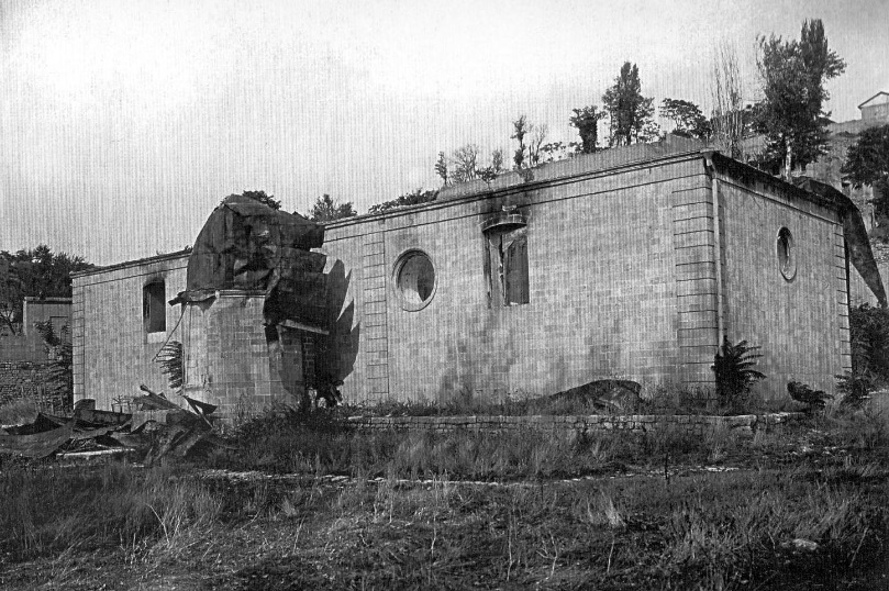 “Yuxarı Qala məscidi”, Hacı Seyid Əli Ağanın qəbri ilə cənub tərəfdən